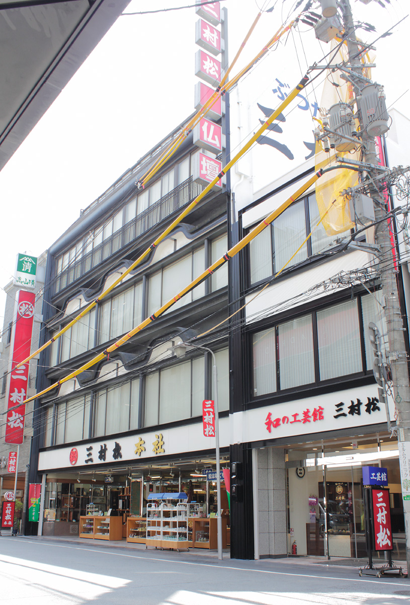 三村松本社・和の工芸館